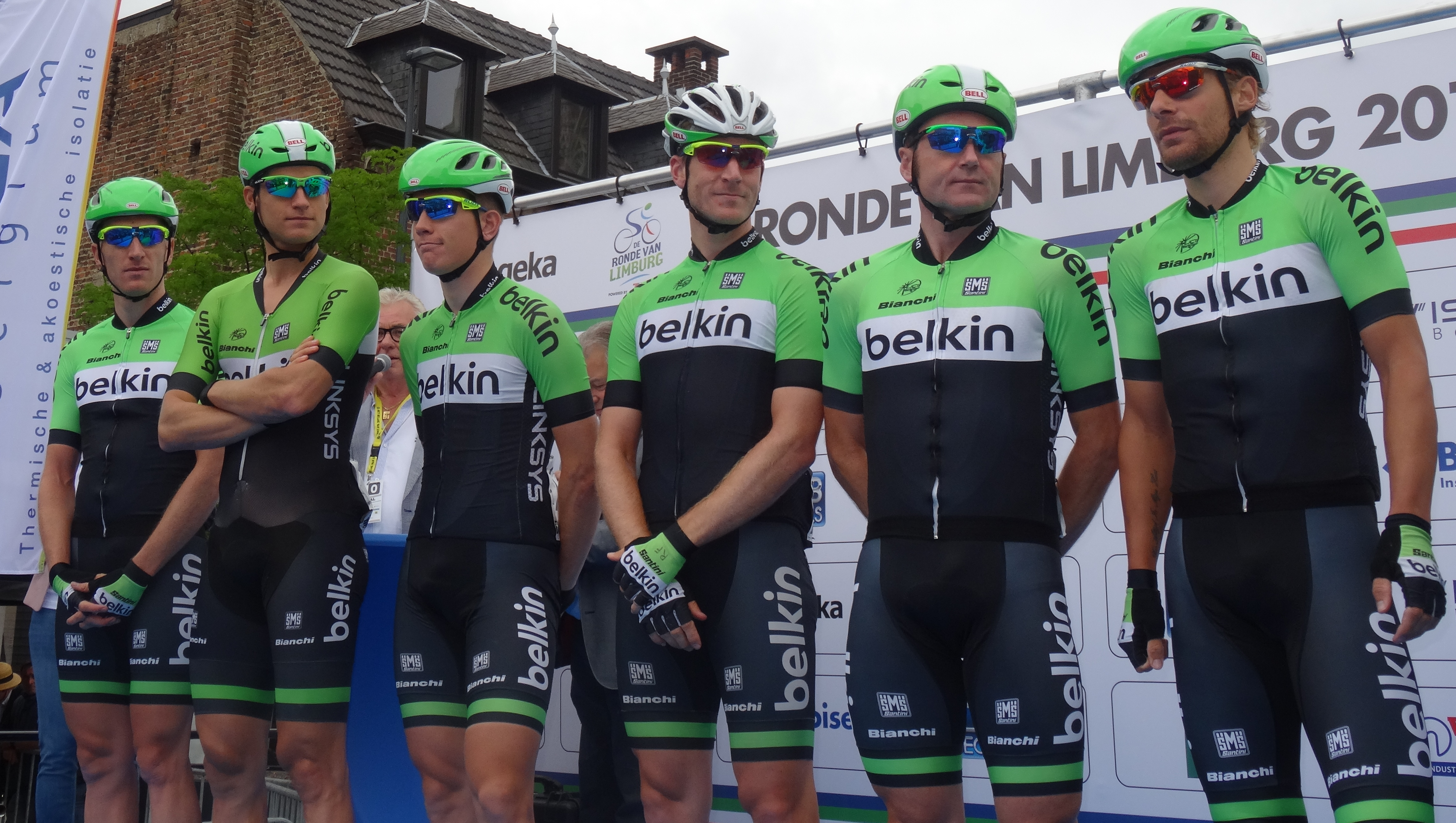 Reportage photographique réalisé le dimanche 15 juin à l'occasion du départ et de l'arrivée du Tour du Limbourg 2014 à Tongres, Belgique.